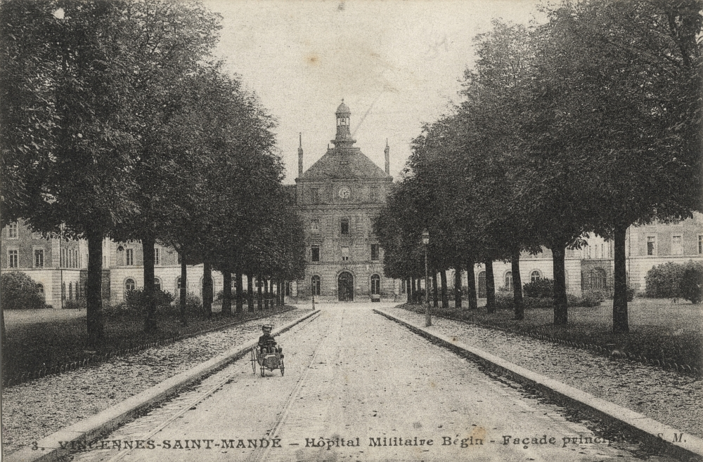 Vincennes-Saint-Mandé : hôpital militaire Bégin, façade principale.